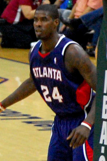 Cleveland Cavaliers vs Atlanta Hawks